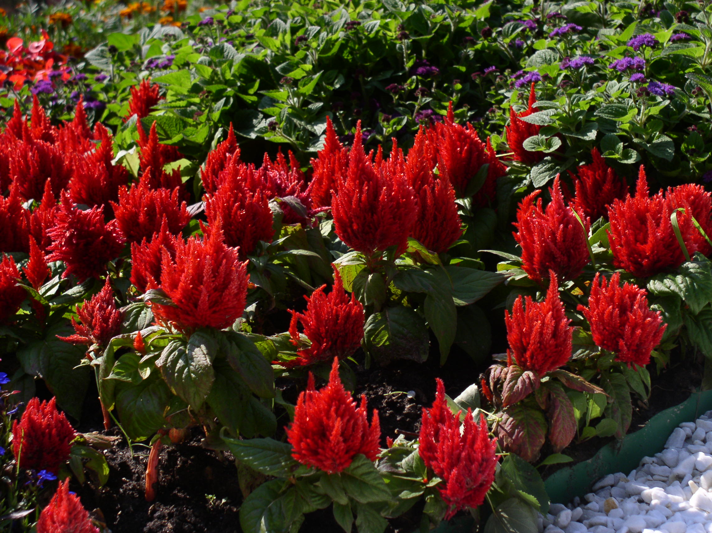 Celosia argentea Taken in Minsk, Belarus. Identified by Ies